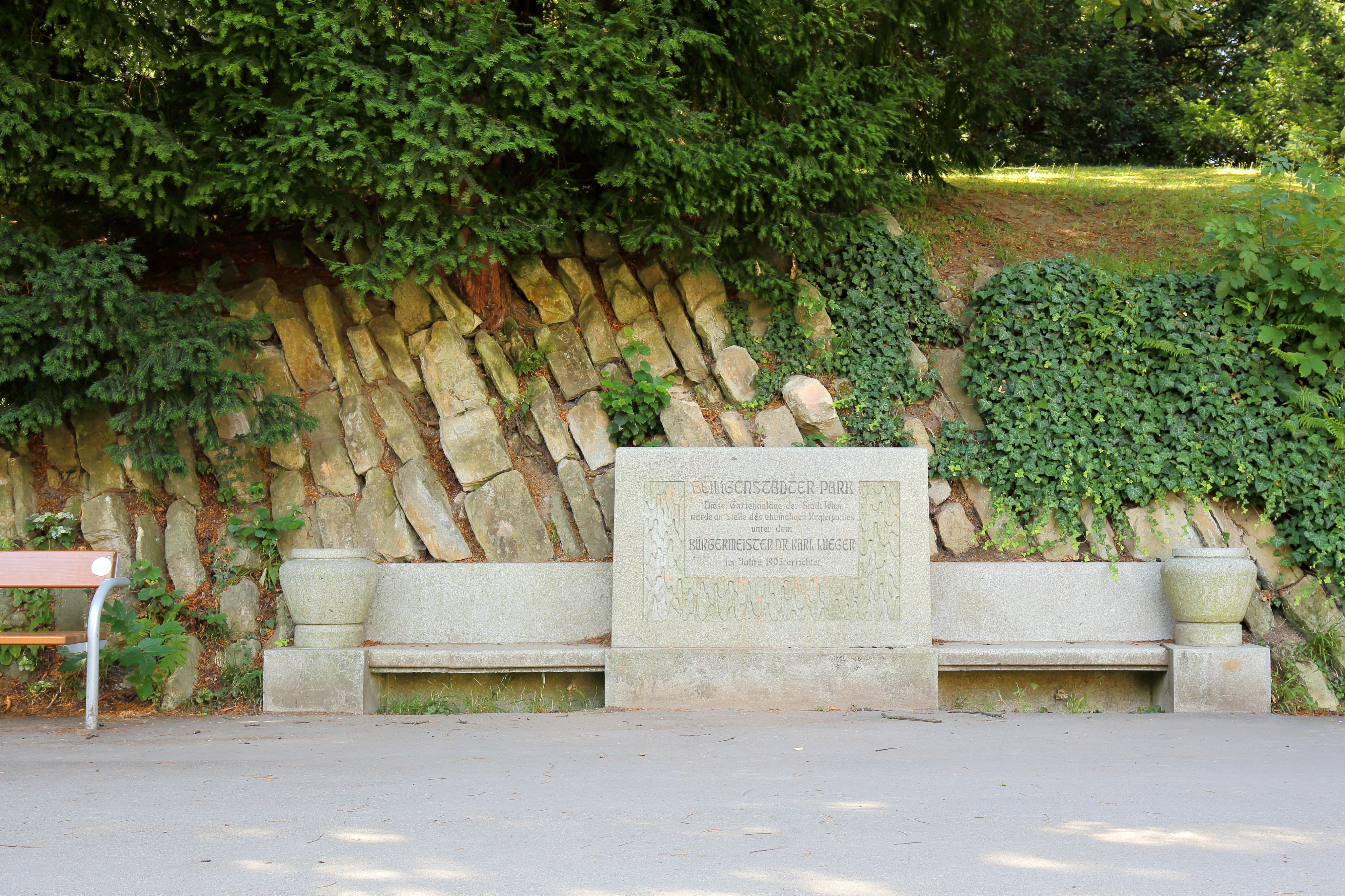 Der Gründungsstein des Heiligenstädter Parks in Heiligenstadt, ein Ortsteil des 19. Wiener Gemeindebezirkes Döbling. Eine Steinbank mit mittig gesetzten Inschriftenstein zur Errichtung der Parkanlage, die unter Bürgermeister Karl Lueger Anfang des 20. Jahrhunderts errichtet wurde.